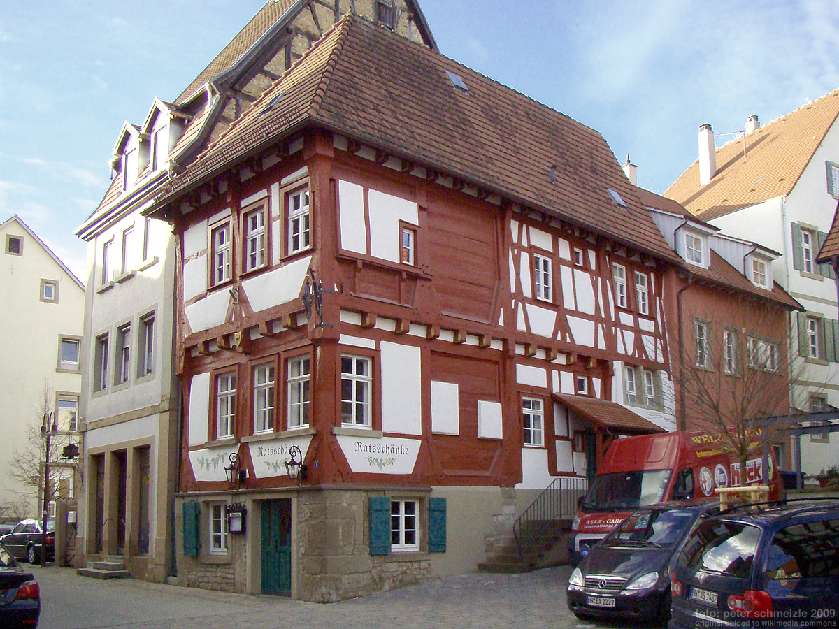 Ratsschänke in Eppingen